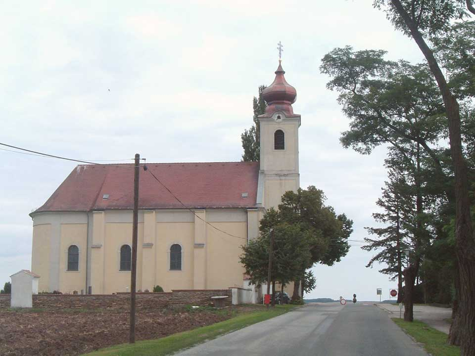 The church of Dürnbach, Burgenland, Austria